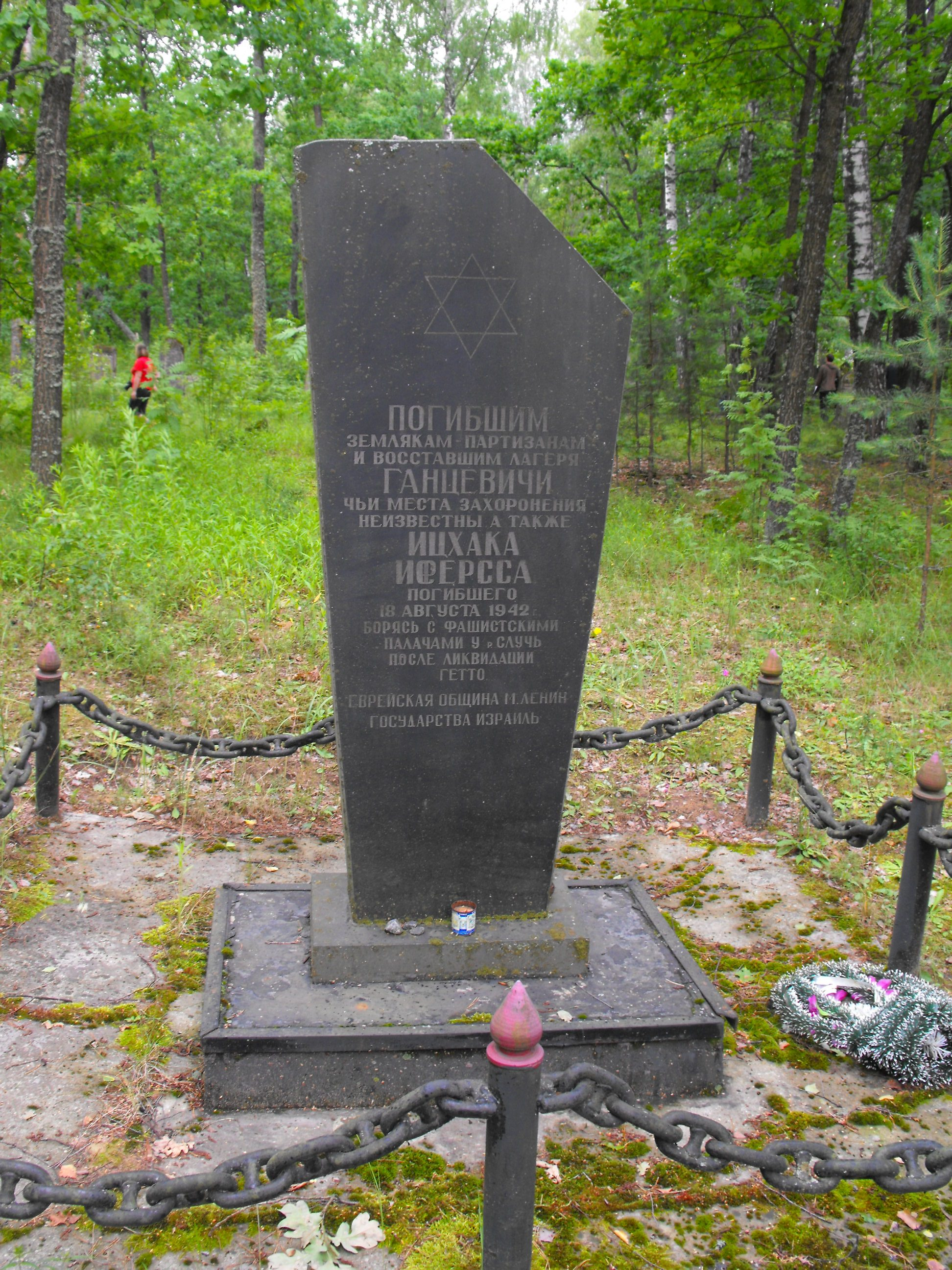 Памятник евреям, погибшим при восстании в Ганцевичах, - чьи места захоронений неизвестны, землякам-партизанам и Ицхаку Исерссу, убитому при уничтожении гетто в местечке Случь. Находится на еврейском кладбище в деревне Ленин.